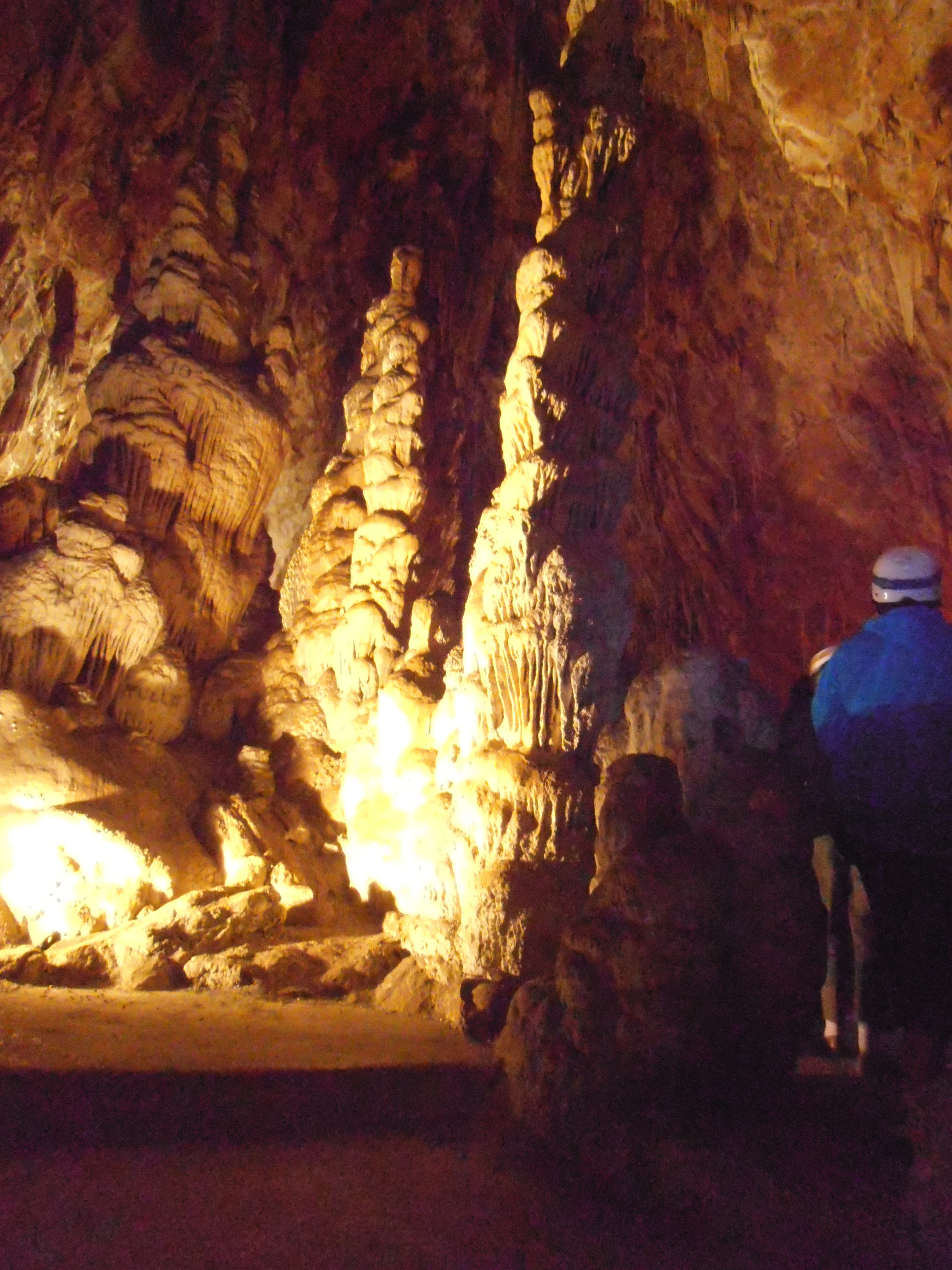 Italia – Trieste – Slivia - Grotta delle Torri di Slivia